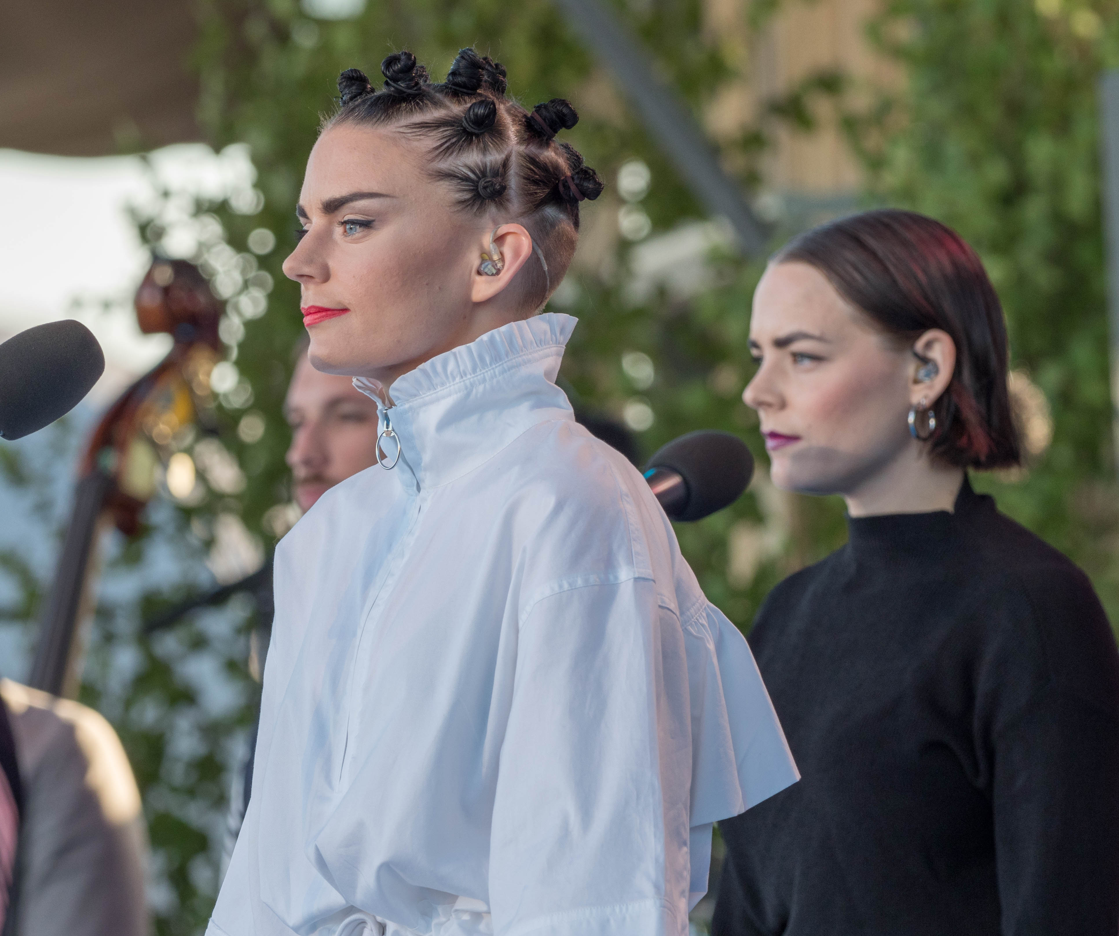 Frida Sundemo